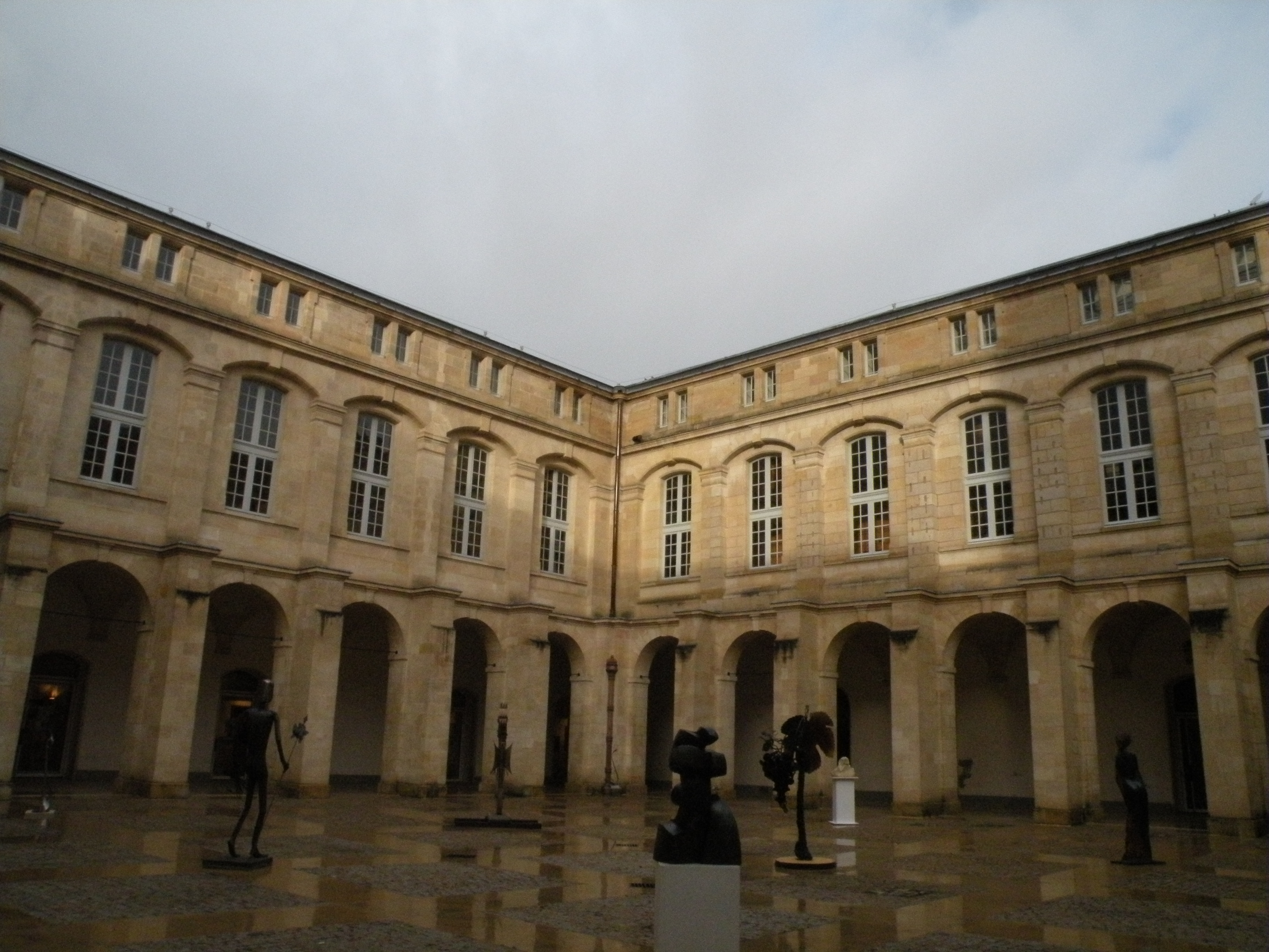 La cour Mably, ancien couvent des Jacobins, adossé à l’église Notre-Dame de Bordeaux.